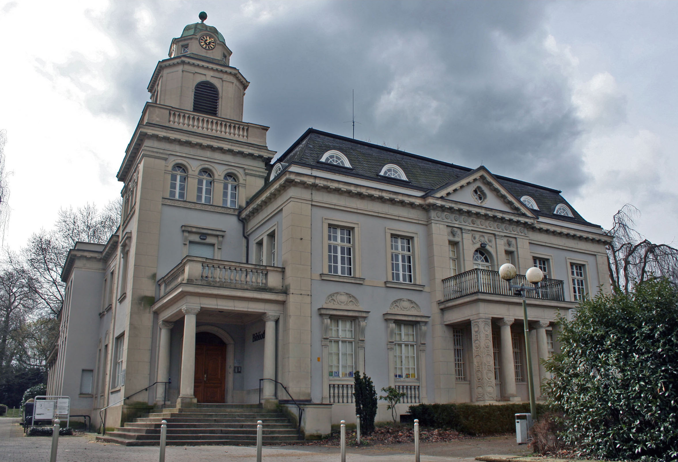 Haus Schulte Witten DortmundThis is a photograph of an architectural monument., no. A 0847